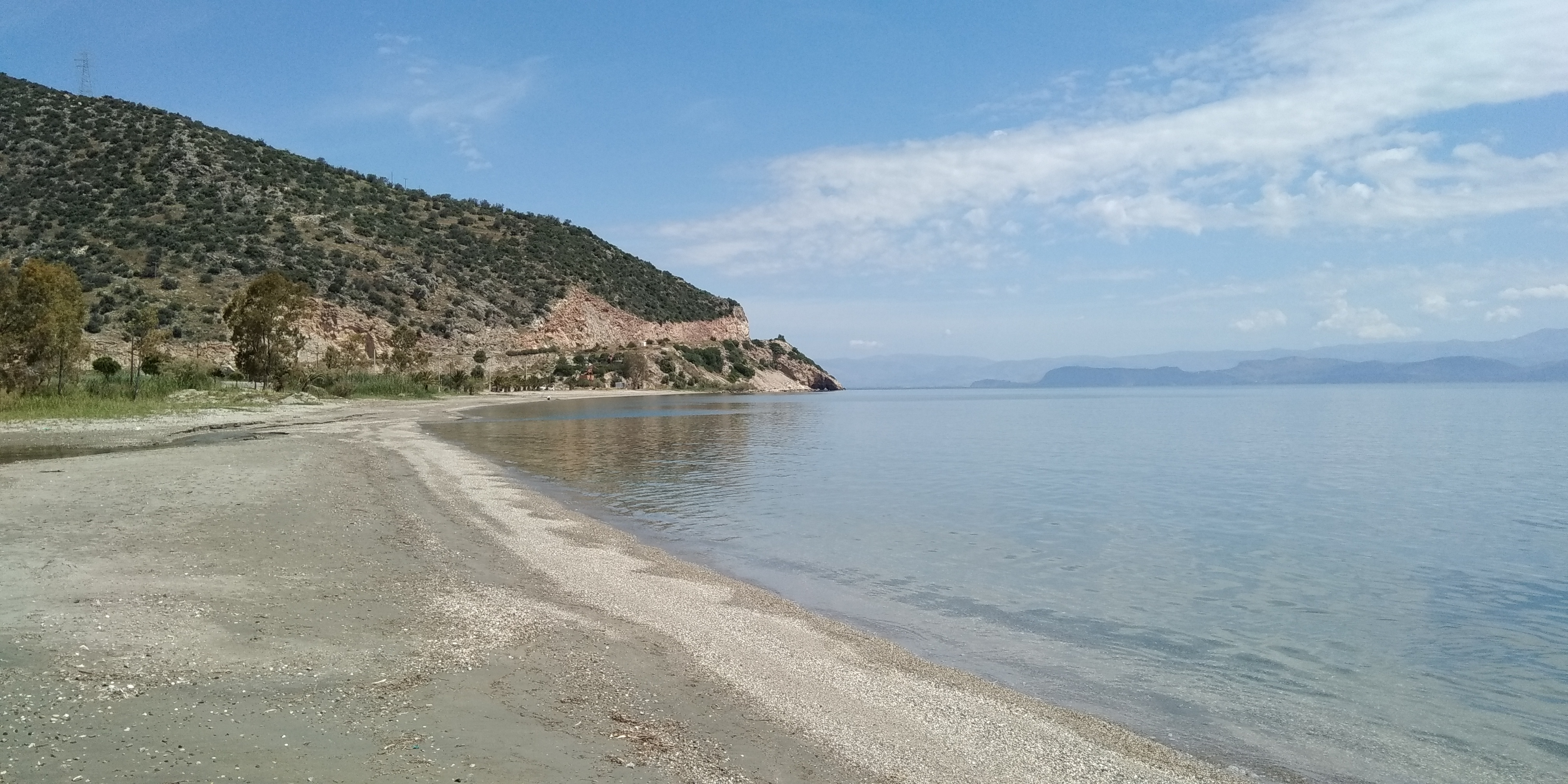 Paliochano Beach "Παραλία Παλιόχανο" , Kato Vervena, Arcadie, Grèce